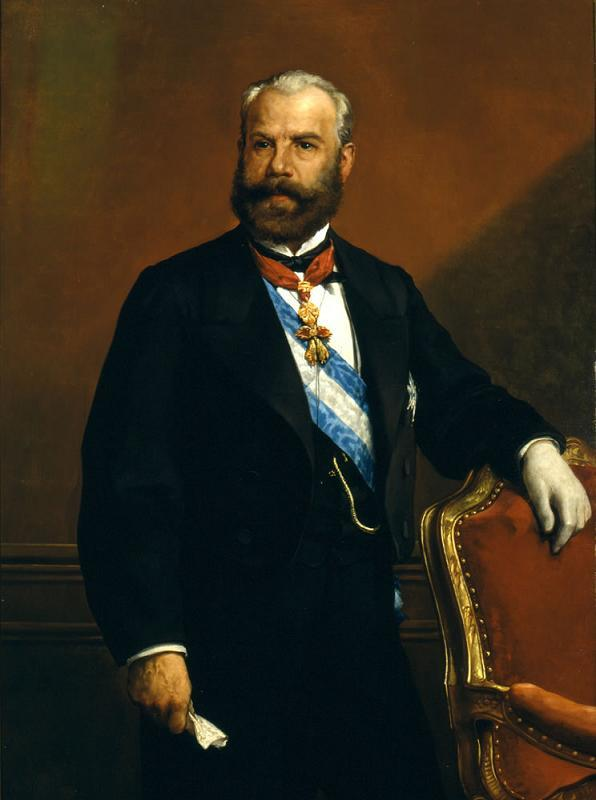 Retrato del político y jurista español Antonio de los Ríos Rosas (1812-1873).